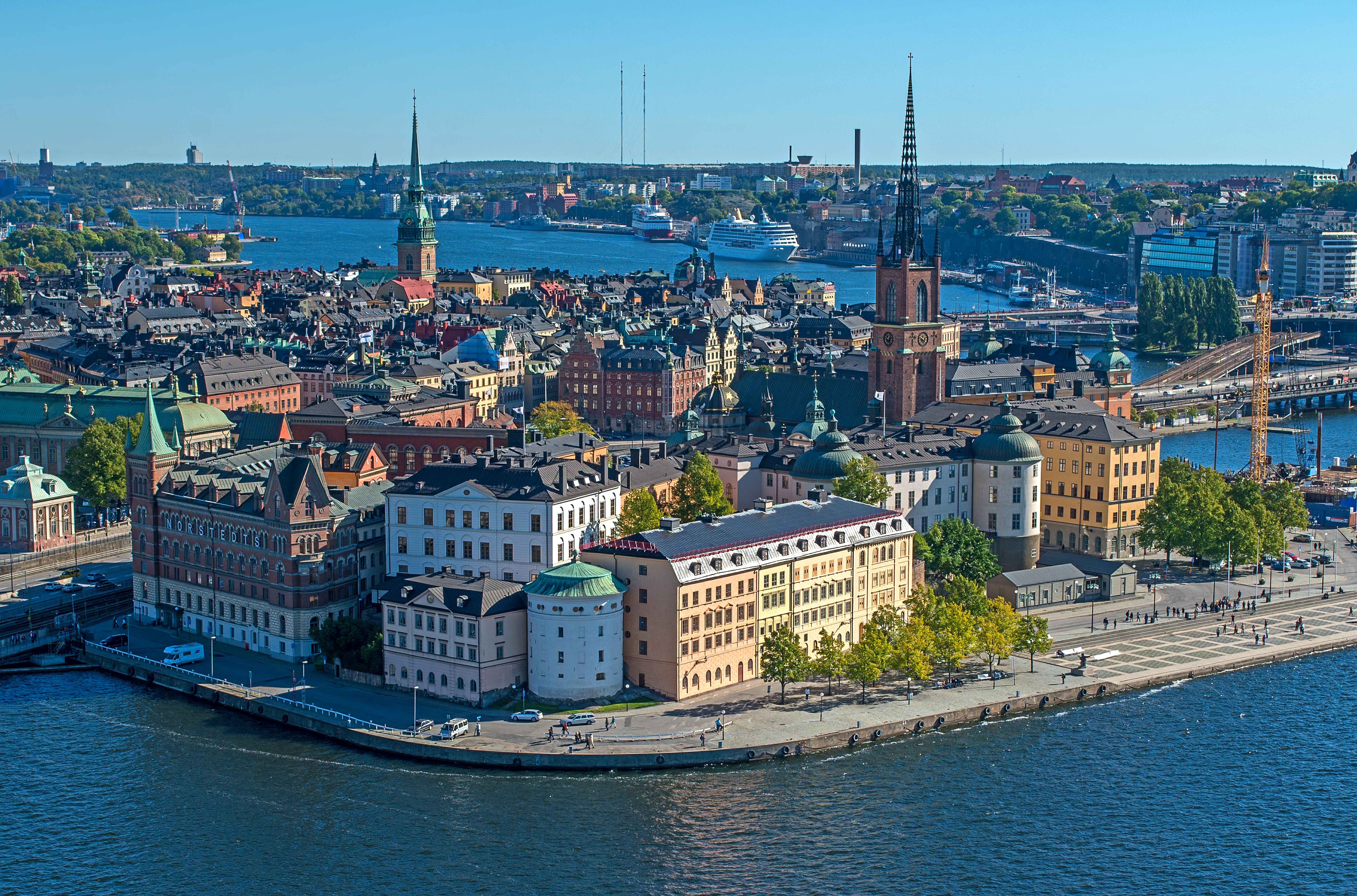 View from Stadshustornet Stockholm September 2013